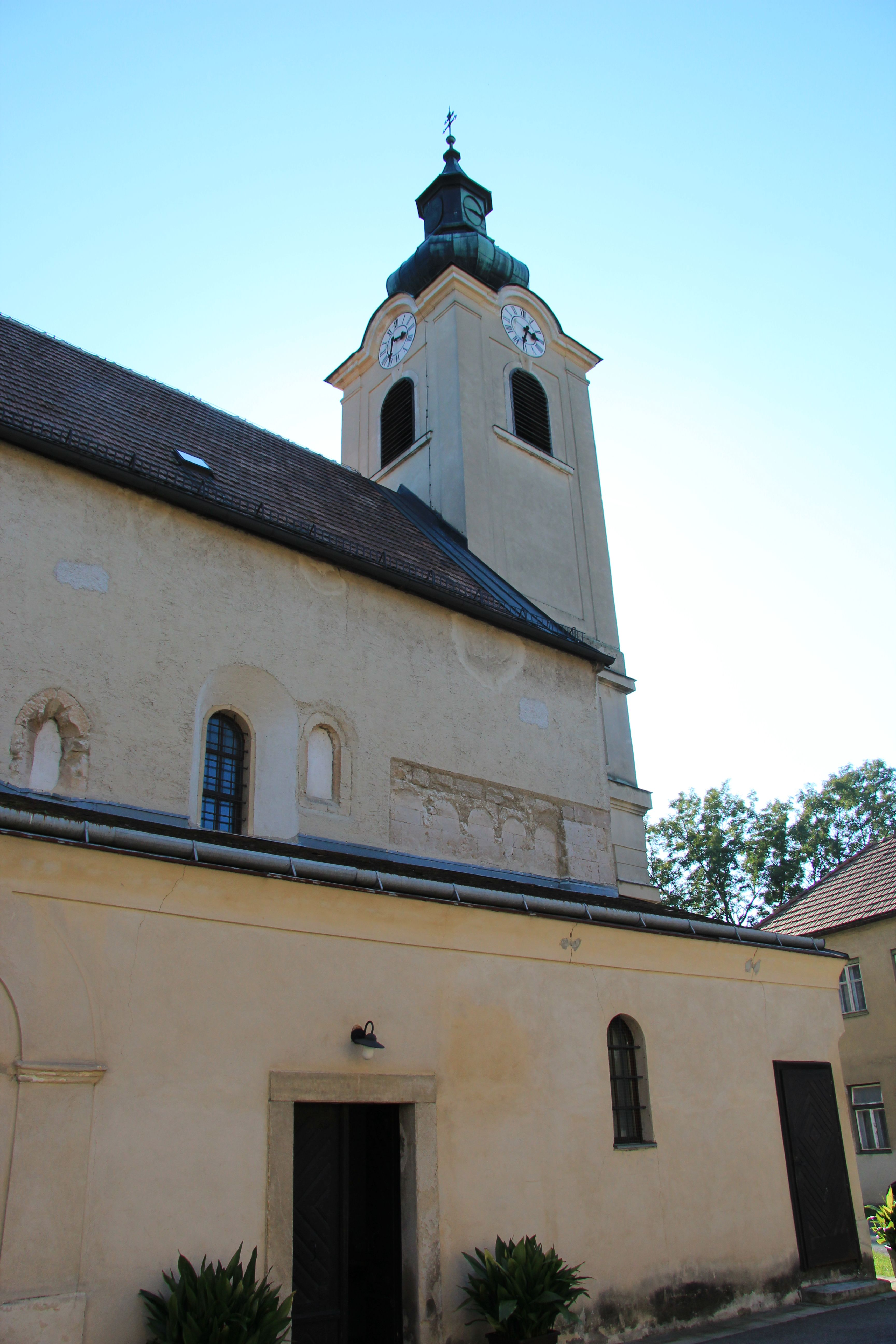 Kath. Pfarrkirche hl. Bartholomäus in Unterwaltersdorf